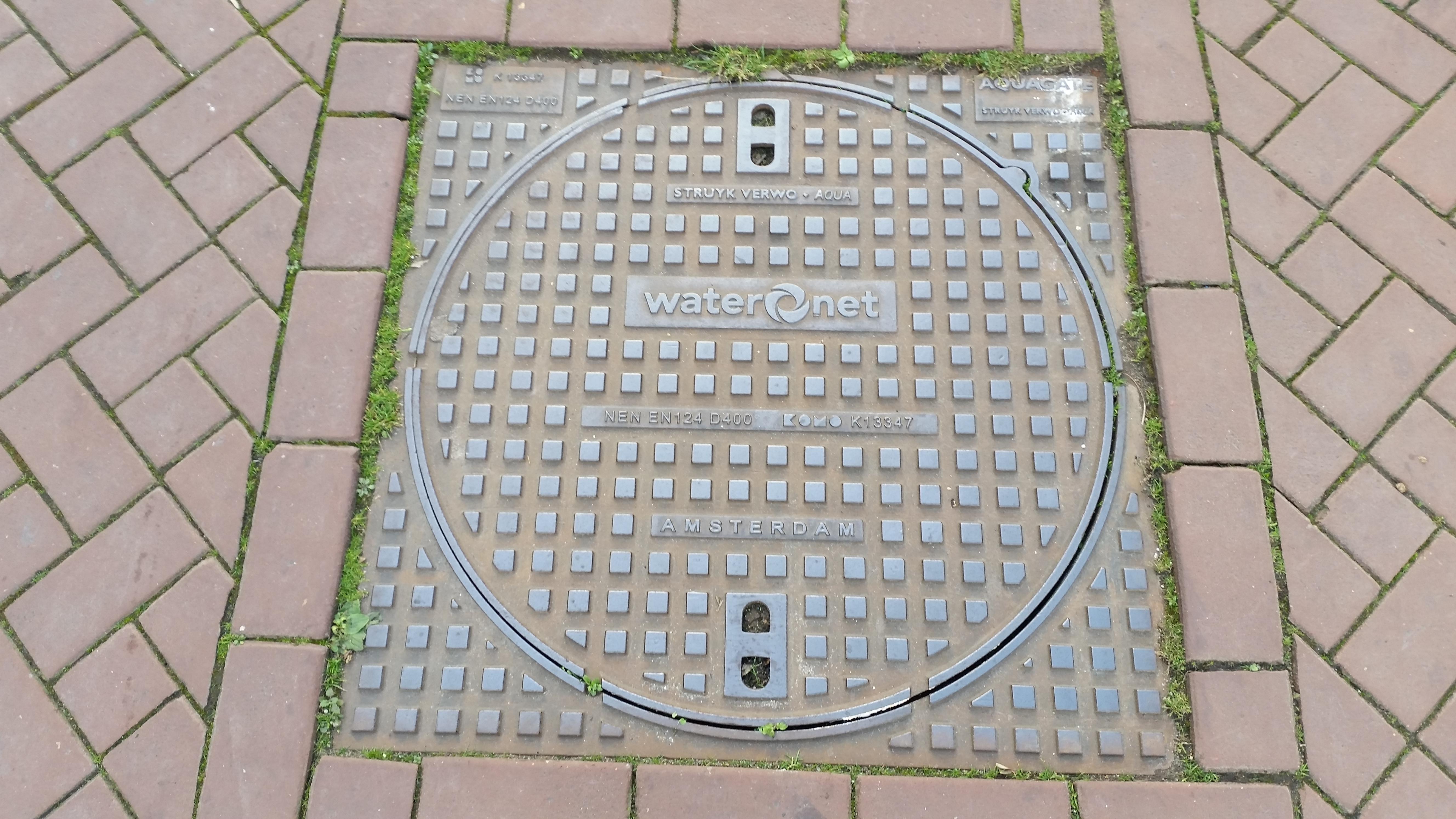 Speelmanstraat, Amsterdam, putdeksel van Waternet na herinrichting straat